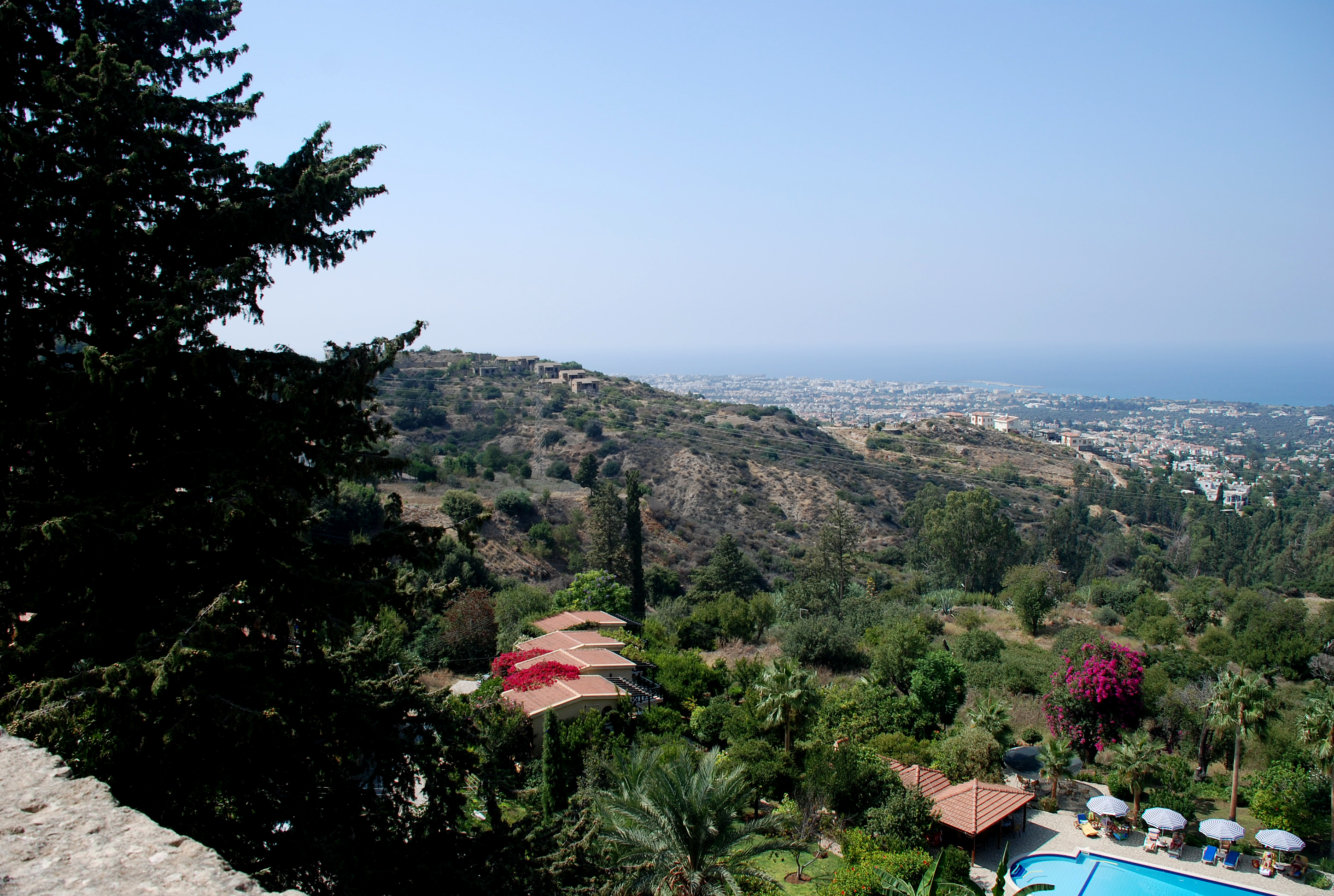 Bellapais, Girne, Nordzypern: Blick nach Nordwesten auf die Stadt Girne/Kyrenia